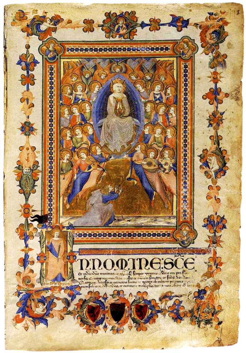 Virgin of Assumption. Niccolo di ser Sozzo.1336-38